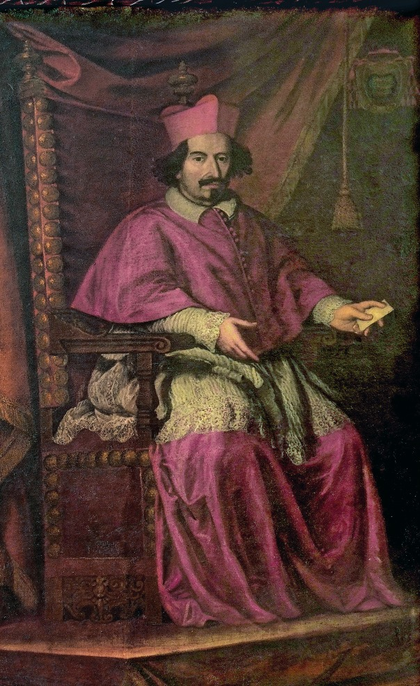 Ritratto del patriarca di Aquileia Giovanni Dolfin San Daniele del Friuli, duomo